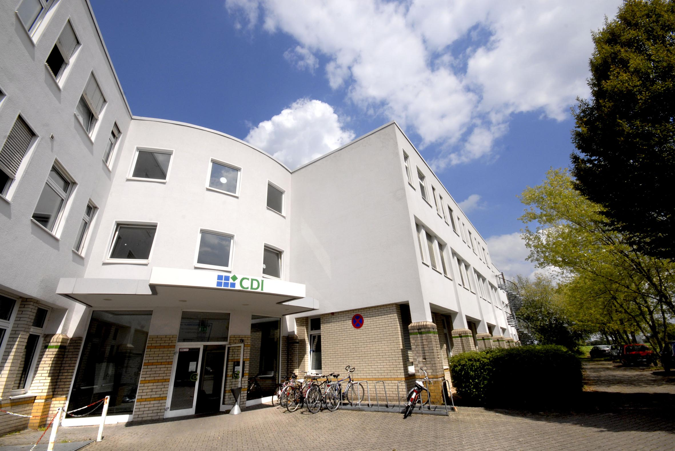 Foto des Gebäudes in dem der Bereich Hochschuldidaktik, sowie die Professur für Hochschuldidaktik und Hochschulforschung des Zentrum für HochschulBildung in Dortmund verortet sind.